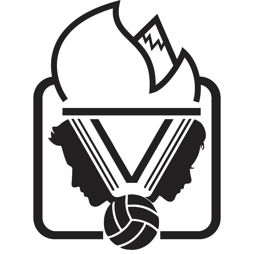 چهل‌ویکمین اردوی دانش‌آموزان زرتشتی سراسر کشور